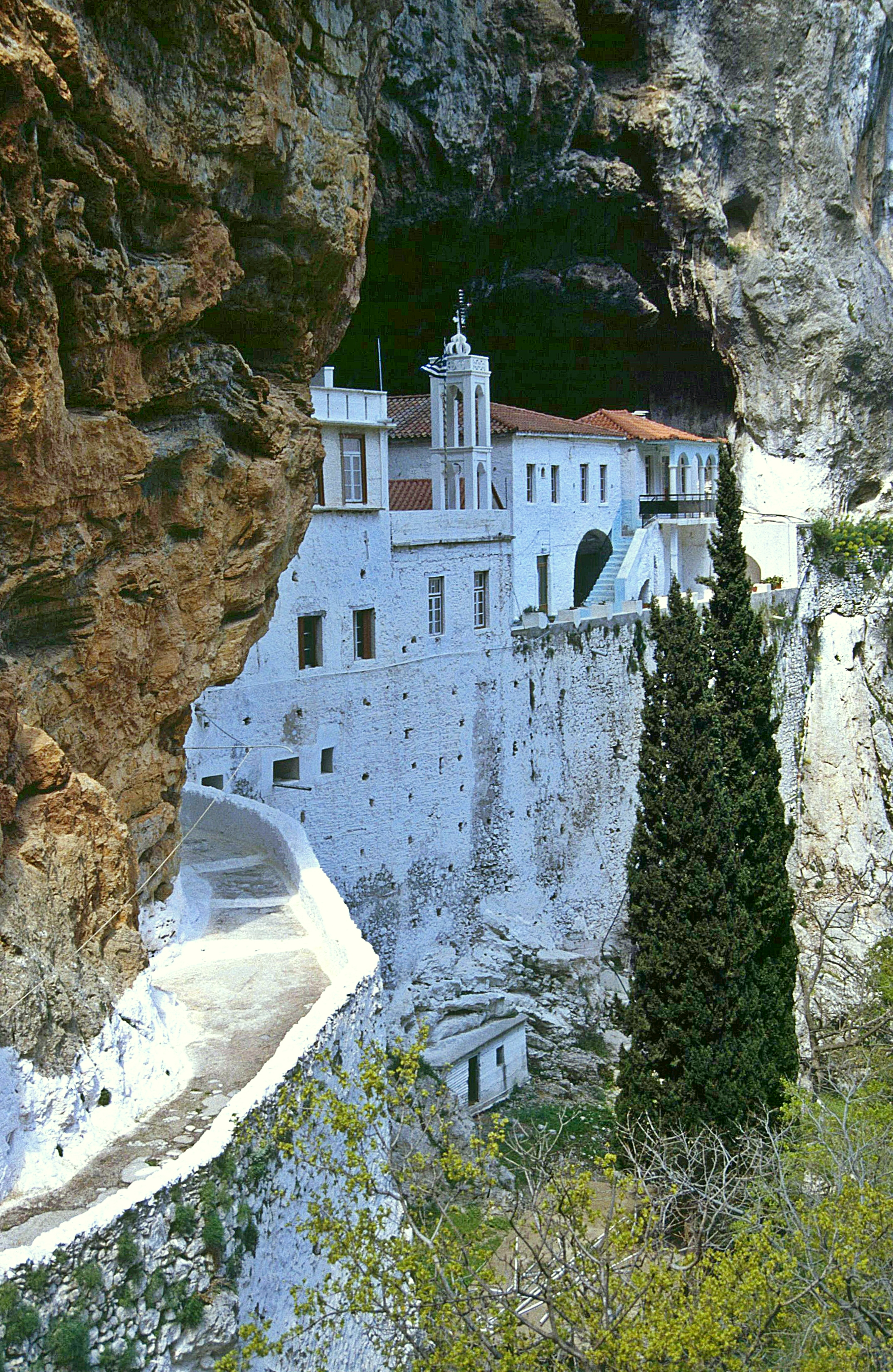 Felsenkloster Agios Nikolaos Sintzas/Peloponnes